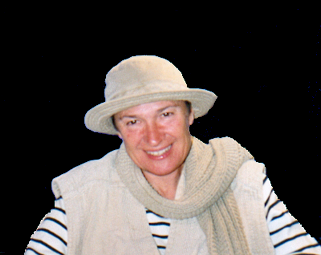 Portrait d'Lydie Arickx.